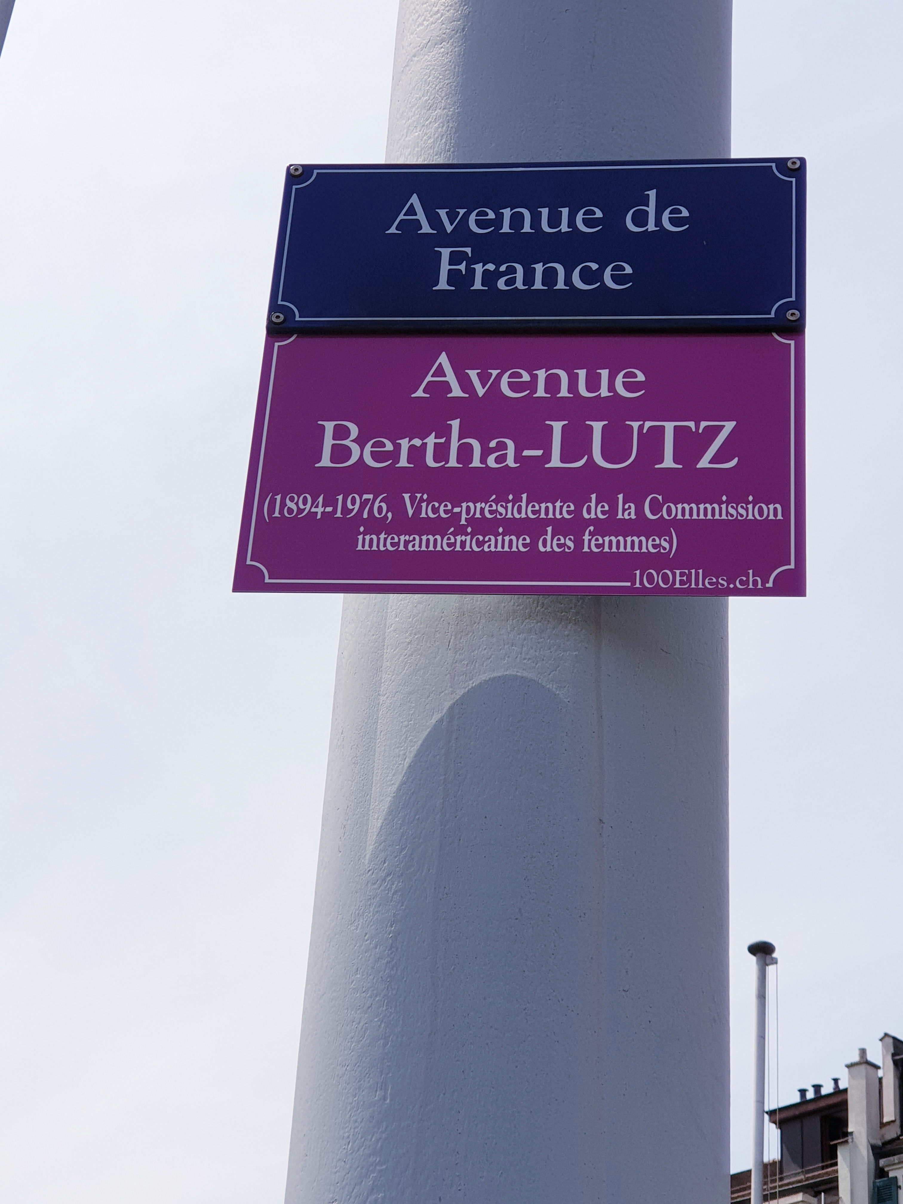 Plaque temporaire de rue apposée dans le cadre du projet 100elles à Genève en 2019